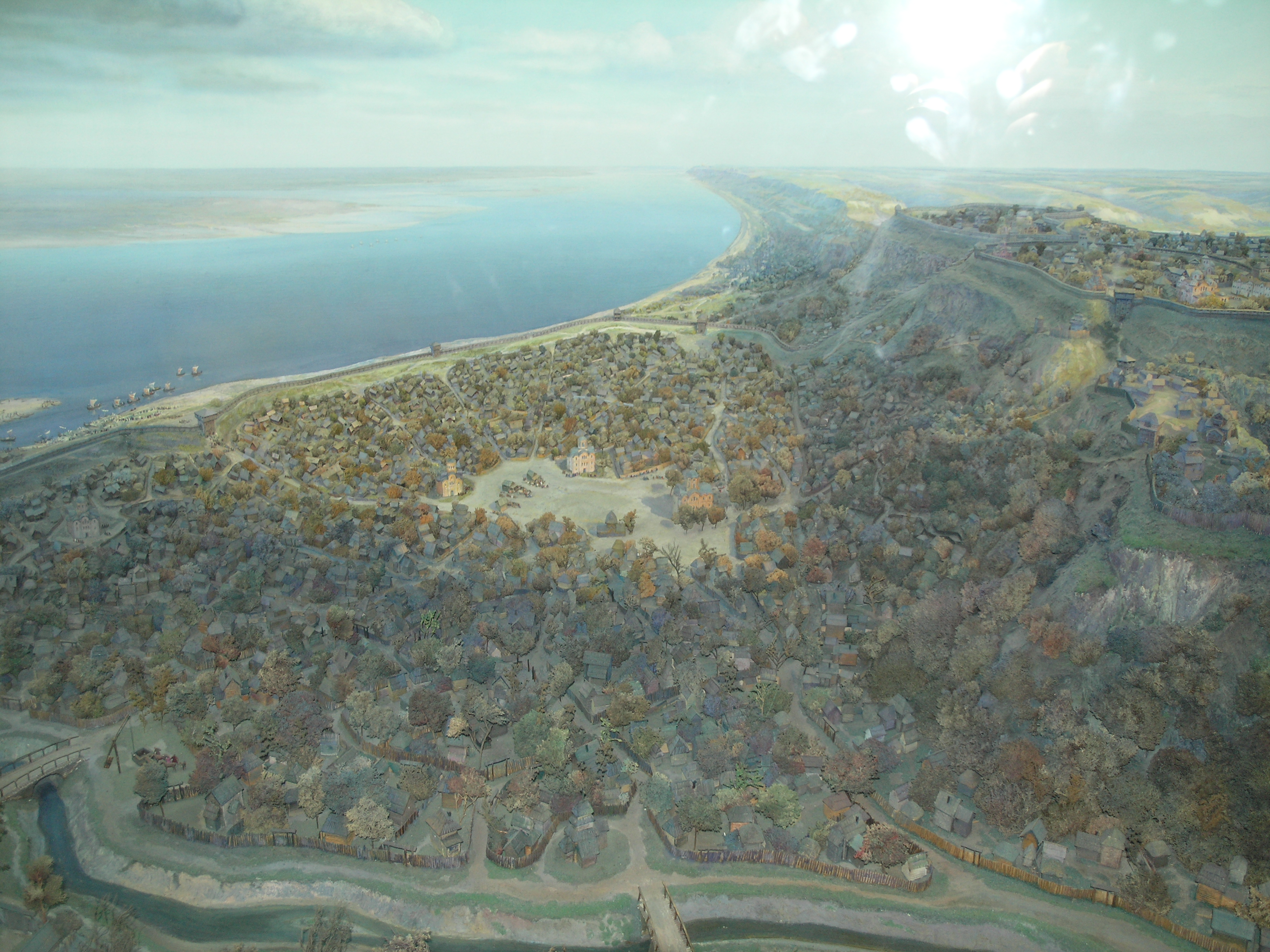 Україна, Київ, Старокиївська гора - Будинок Київської художньої школи ім. Т. Шевченка, де з 1944 р. розміщується Державний історичний музей України, з діяльністю якого і формуванням колекцій пов'язані імена Ернста Ф., Потоцького П., Хвойки В., Біляшівського М., Щербаківського Д. та ін.